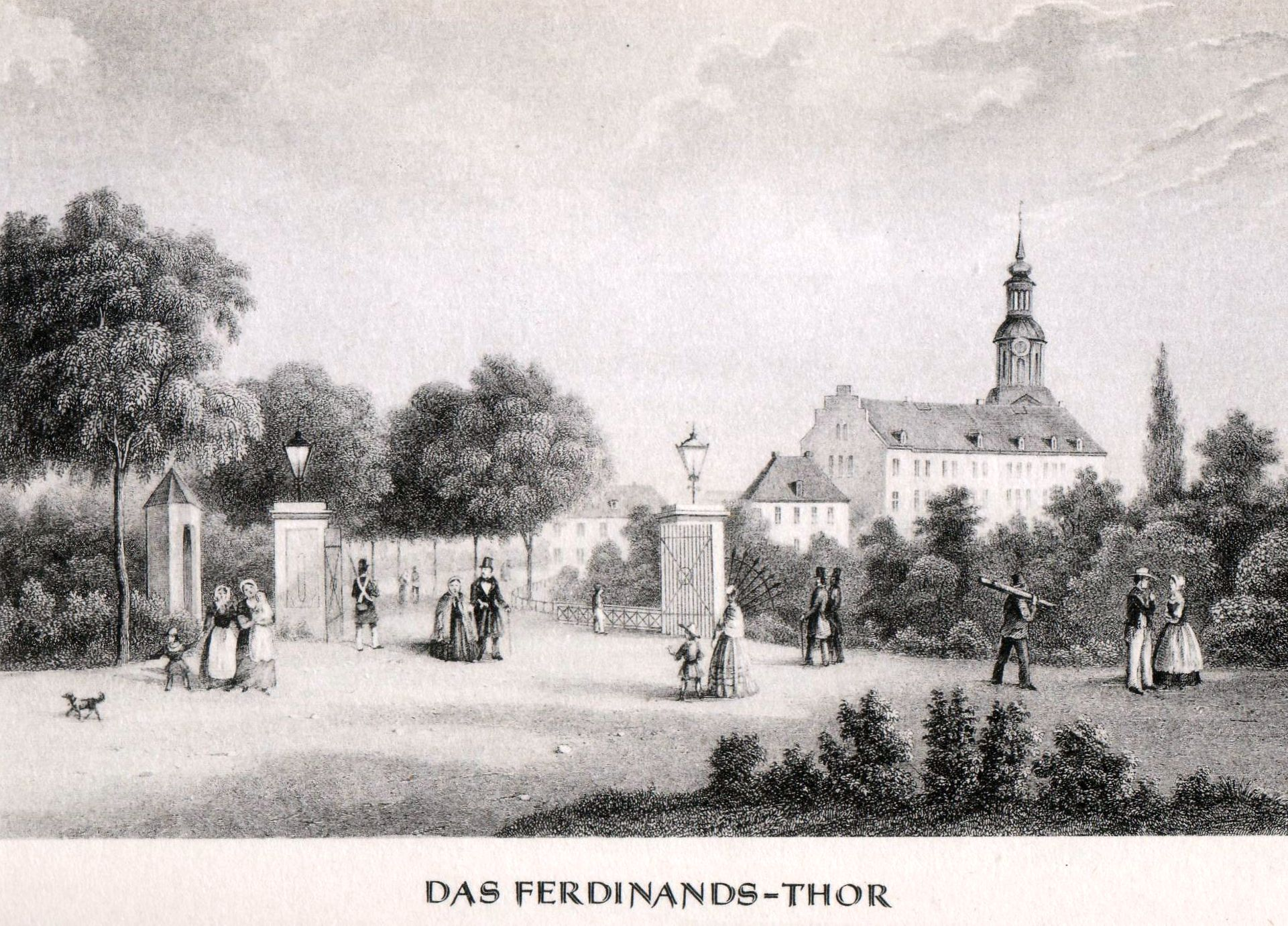 Das Ferdinandsthor in Hamburg um 1850, gezeichnet von J. Gottheil, gestochen von J. Poppel und G. Kurz